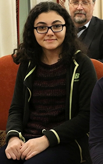 Gövhər Beydullayeva 2017-ci ildə